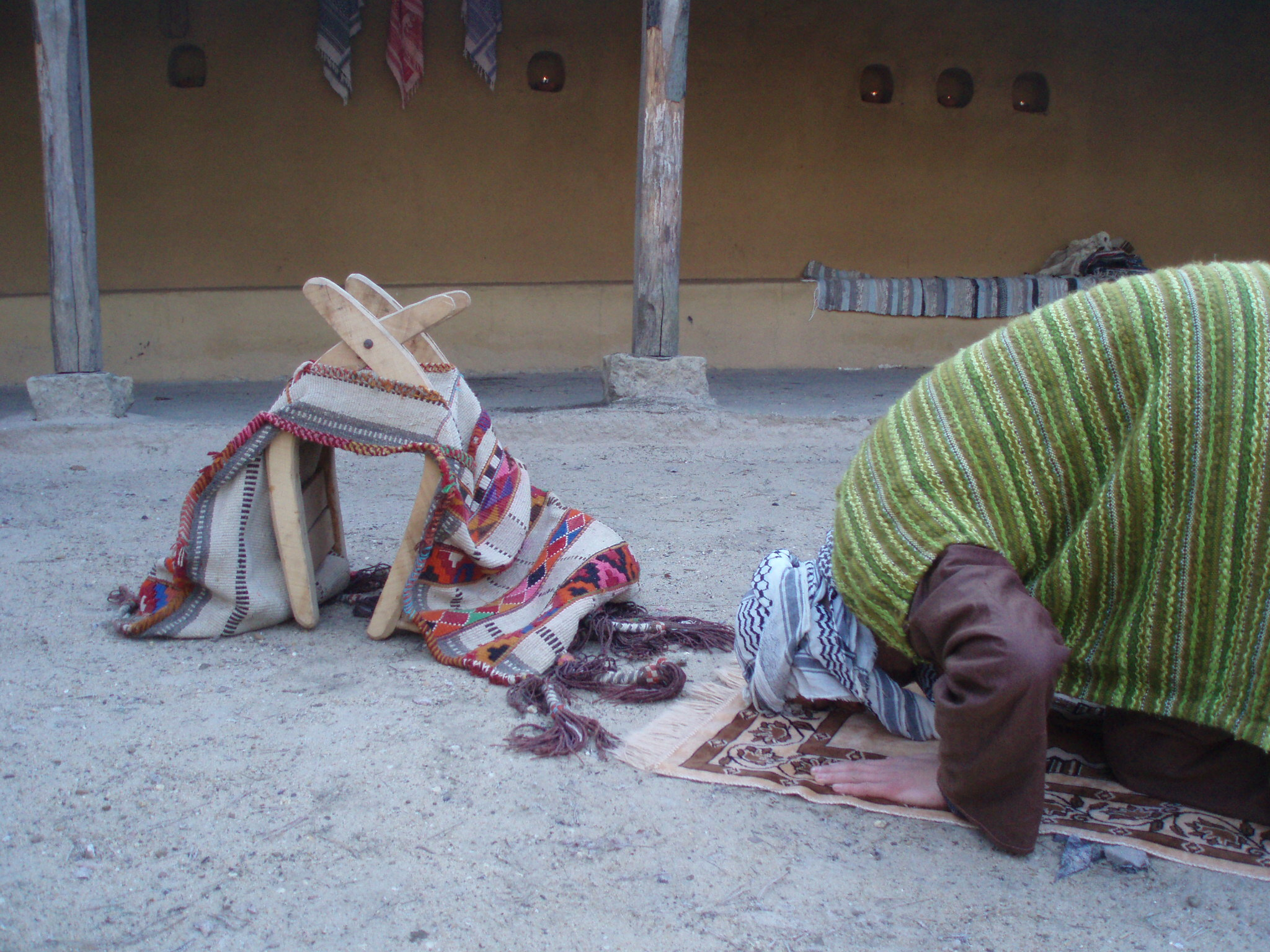 Muslim prayer with using a sutrah (